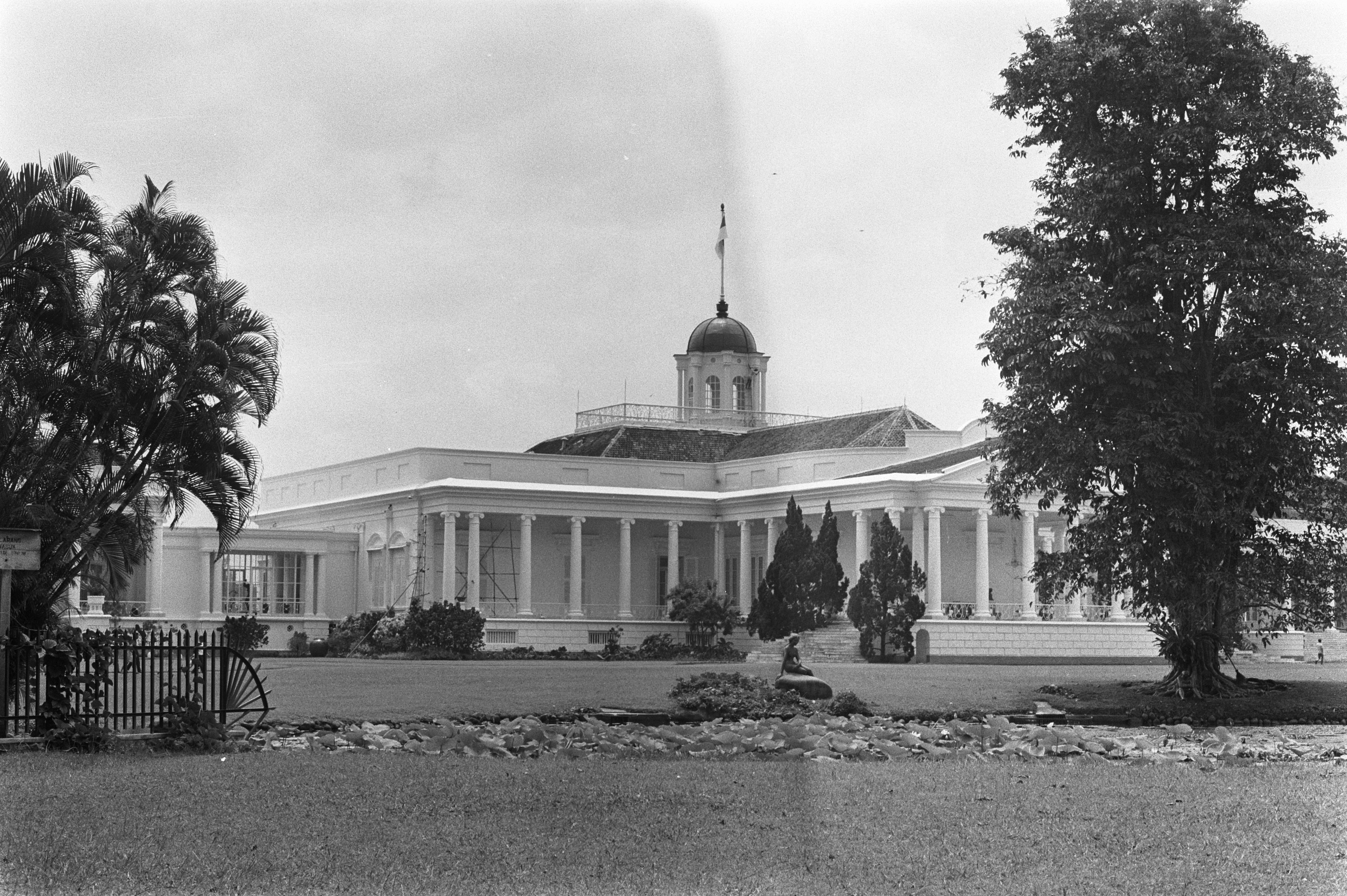 Collectie / Archief : Fotocollectie Anefo Reportage / Serie : [ onbekend ] Beschrijving : Indonesie, Paleis te Bogor (voormalig Buitenzorg) waar president Soekarno woonde Datum : 22 augustus 1971 Locatie : Bogor, Indonesië, Indonesië Trefwoorden : paleizen Persoonsnaam : Buitenzorg, Soekarno Fotograaf : Evers, Joost / Anefo Auteursrechthebbende : Nationaal Archief Materiaalsoort : Negatief (zwart/wit) Nummer archiefinventaris : bekijk toegang 2.24.01.05 Bestanddeelnummer : 924-8437